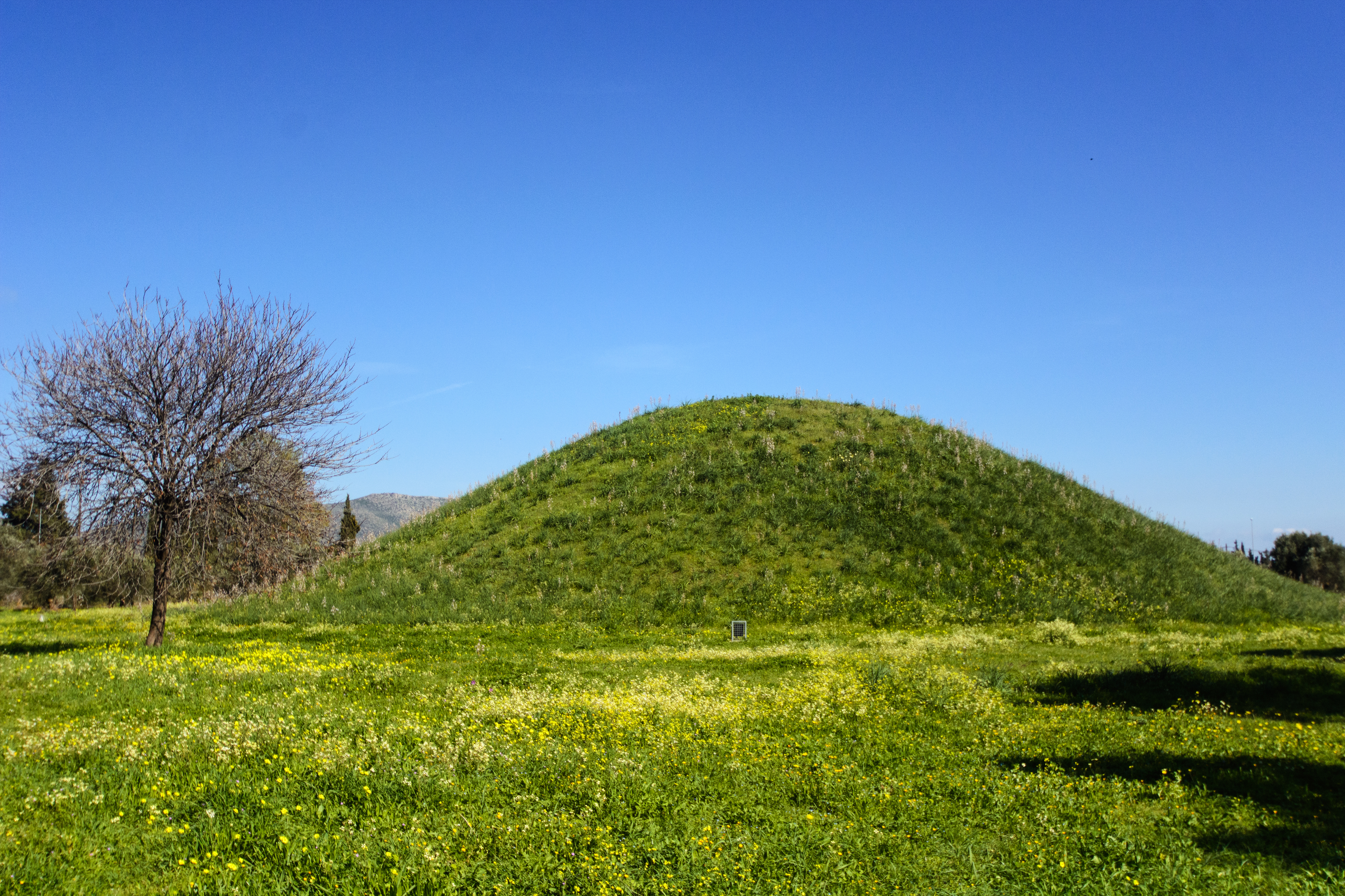 Τύμβος Αθηναίων στο Μαραθώνα«Τύμβος Αθηναίων στο Μαραθώνα»